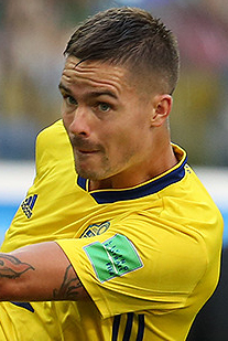 Сборная Швеции зрелищно вышла в четвертьфинал ЧМ-2018